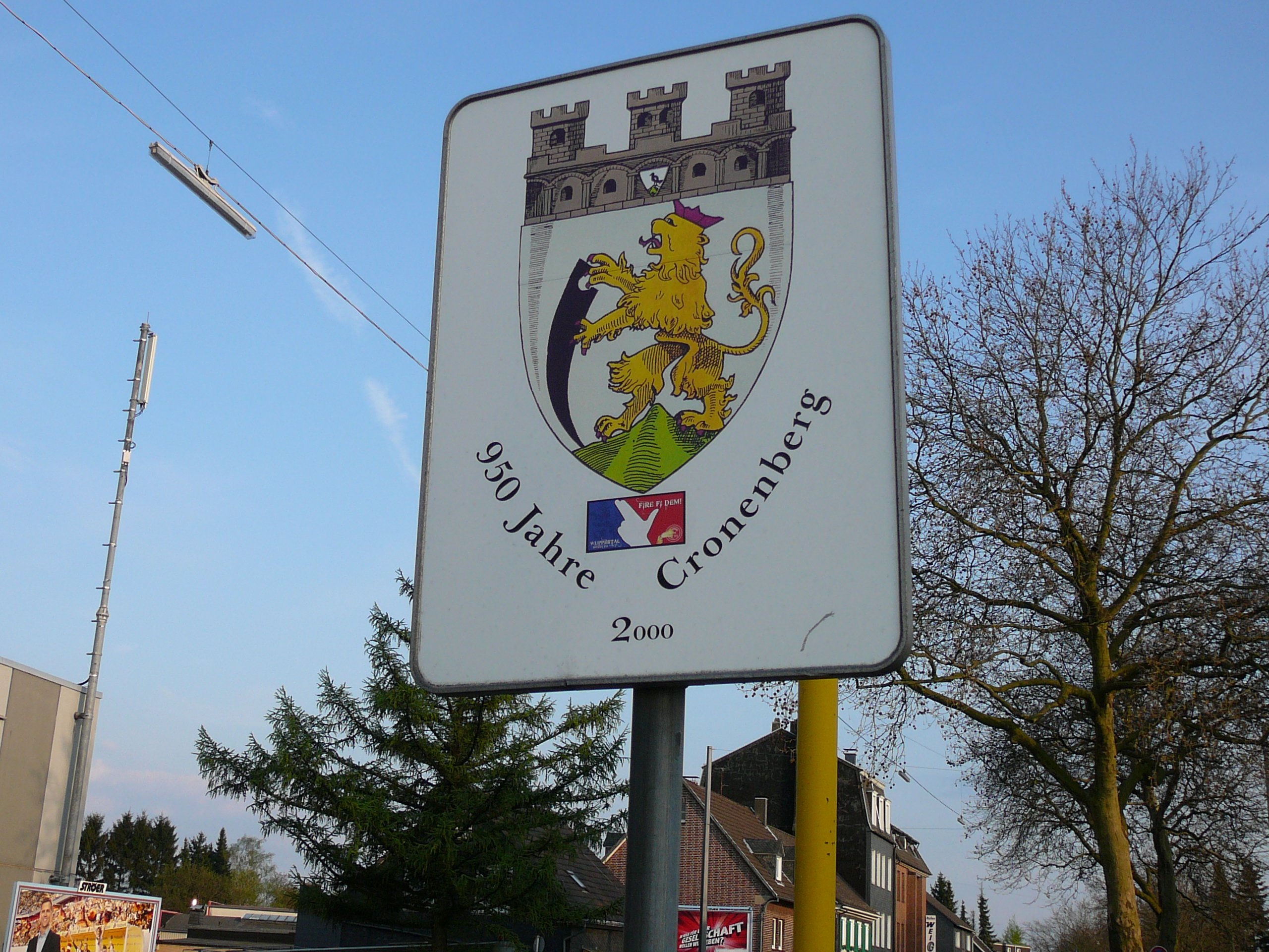 Hahnerberger Str, Wuppertal